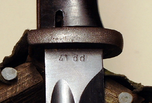 Kennzeichnung 41 dll auf Bajonett für K 98k